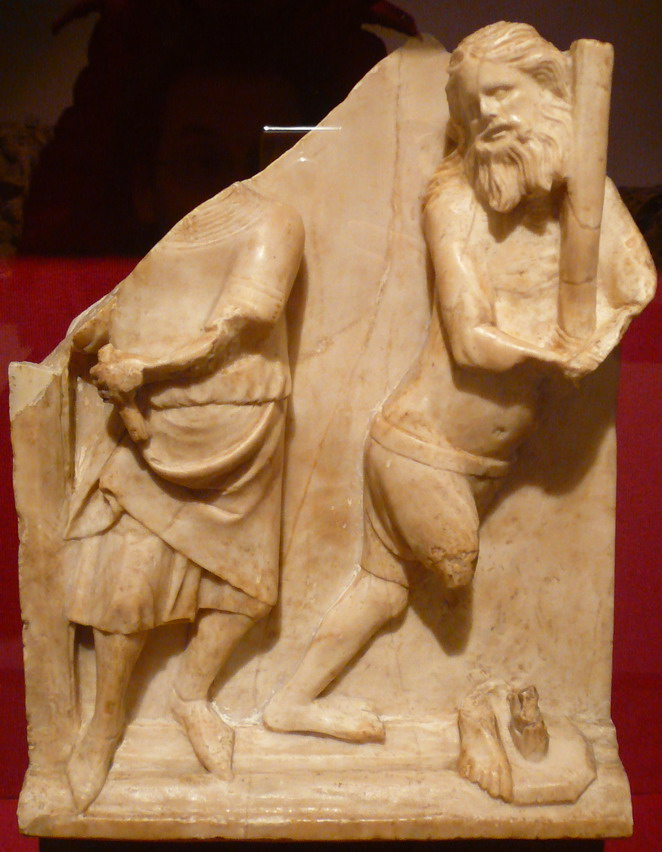 Flagel·lació. Compartiment de retaule de Jaume Cascalls procedent de Santa Maria de Cornellà de Conflent. Actualment al museu Marès de Barcelona.